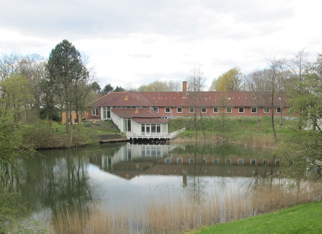 Jaruplund Højskole ved søen i Jaruplund, Sydslesvig